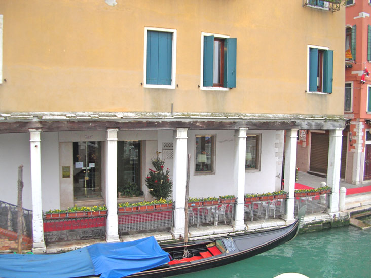 "Sotopòrtego" (sottoportico) su "fondamenta" (strada che corteggia un canale) a Venezia.